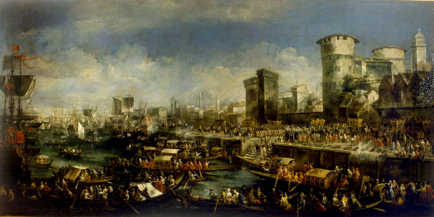 Der Einzug des Botschafters Alvise II. Mocenigo in London 1702 (The arrival of the Ambassador Alvise II. Mocenigo in London 1702)